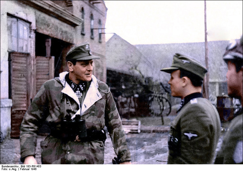 This is a retouched picture, which means that it has been digitally altered from its original version. Modifications: recoloured. The original can be viewed here: Bundesarchiv Bild 183-R81453, SS-Obersturmbannführer Otto Skorzeny an der Oder.jpg: . Modifications made by Ruffneck88. Photographer UnknownOriginal caption SS-Obersturmbannführer Otto Skorzeny an der Oder ADN-Zentralbild /Archiv Februar 1945 Ritterkreuzträger SS-Obersturmbannführer Skorzeny, der Mussolini zur Flucht verhalf, bei einer Lagebesprechung mit SS-Führern einer SS-Fallschirmjäger-Einheit. (an der Oder 1945) [Scherl Bilderdienst] Abgebildete Personen: Skorzeny, Otto: SS-Hauptsturmführer, Ritterkreuz (RK), Waffen-SS, Deutschland (GND 118614886)Date February 1945date QS:P571,+1945-02-00T00:00:00Z/10Collection German Federal Archives Native nameDas BundesarchivLocationKoblenz (headquarters)Coordinates50° 20′ 32.71″ N, 7° 34′ 21.22″ E Established1946Web page control : Q685753 VIAF: 137346469 ISNI: 0000 0004 0555 2728 LCCN: n92025526 NLA: 36455393 Open Library: OL55798A WorldCat institution QS:P195,Q685753Current location Allgemeiner Deutscher Nachrichtendienst - Zentralbild (Bild 183)Accession number Bild 183-R81453 Source This image was provided to Wikimedia Commons by the German Federal Archive (Deutsches Bundesarchiv) as part of a cooperation project. The German Federal Archive guarantees an authentic representation only using the originals (negative and/or positive), resp. the digitalization of the originals as provided by the Digital Image Archive. SS-Obersturmbannführer Otto Skorzeny an der Oder ADN-Zentralbild /Archiv Februar 1945 Ritterkreuzträger SS-Obersturmbannführer Skorzeny, der Mussolini zur Flucht verhalf, bei einer Lagebesprechung mit SS-Führern einer SS-Fallschirmjäger-Einheit. (an der Oder 1945) [Scherl Bilderdienst] Abgebildete Personen: Skorzeny, Otto: SS-Hauptsturmführer, Ritterkreuz (RK), Waffen-SS, Deutschland (GND 118614886)